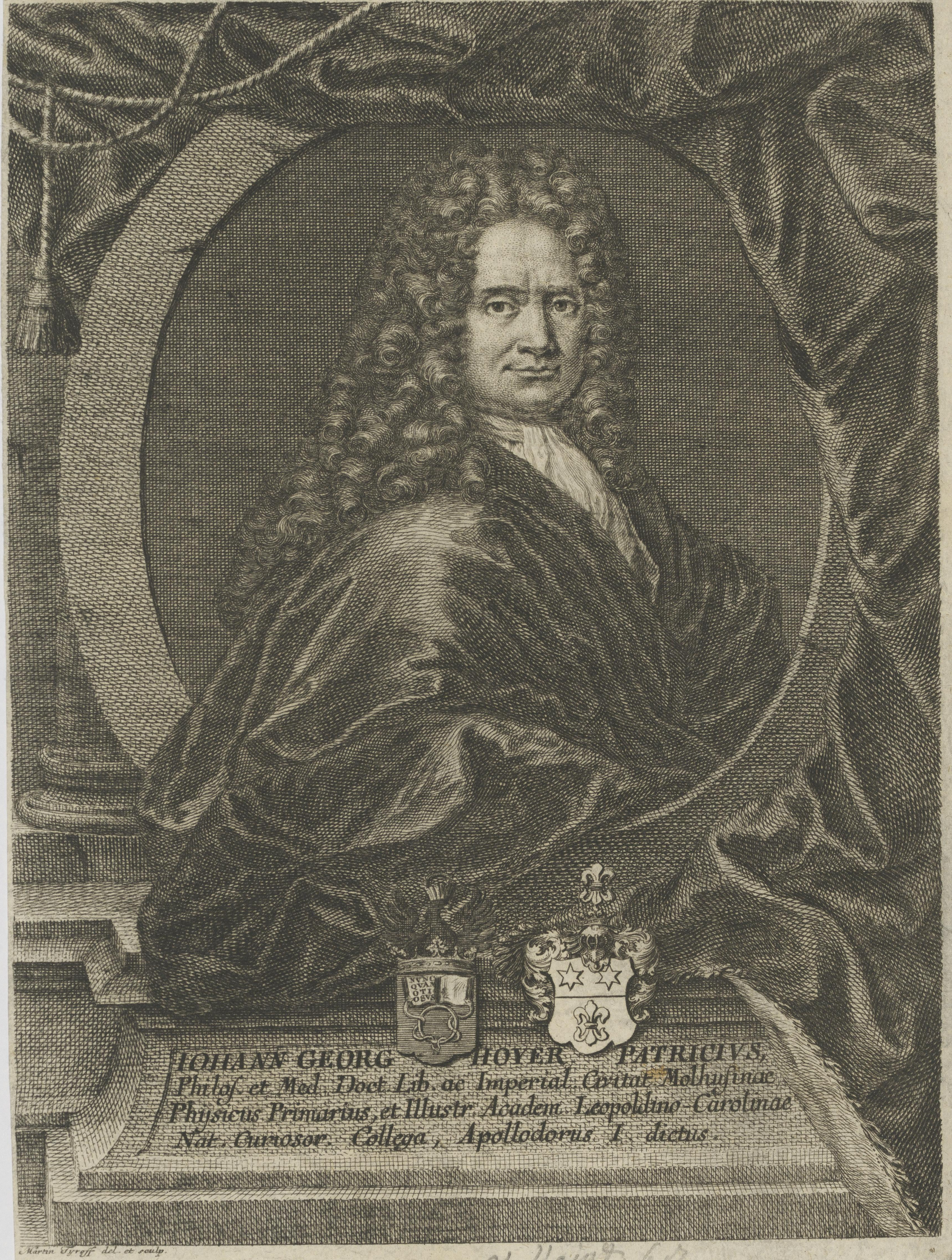 Portrait Johann Geor Hoyer mit persönlichem und leapolidanischem Wappen